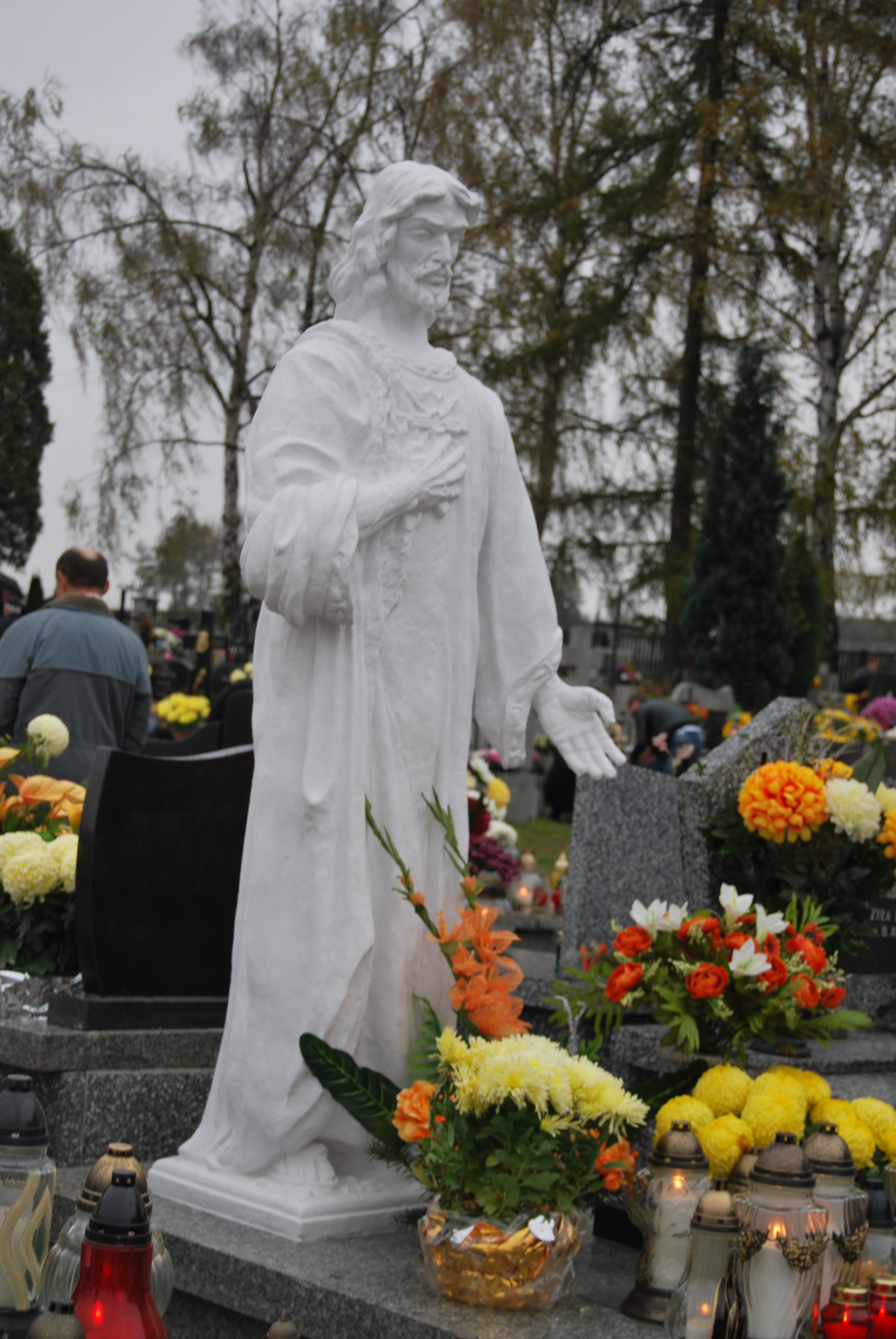 Figura Chrystusa na grobie Otylii i Władysława Dudek . Nowy cmentarz w Gołczy (2012).